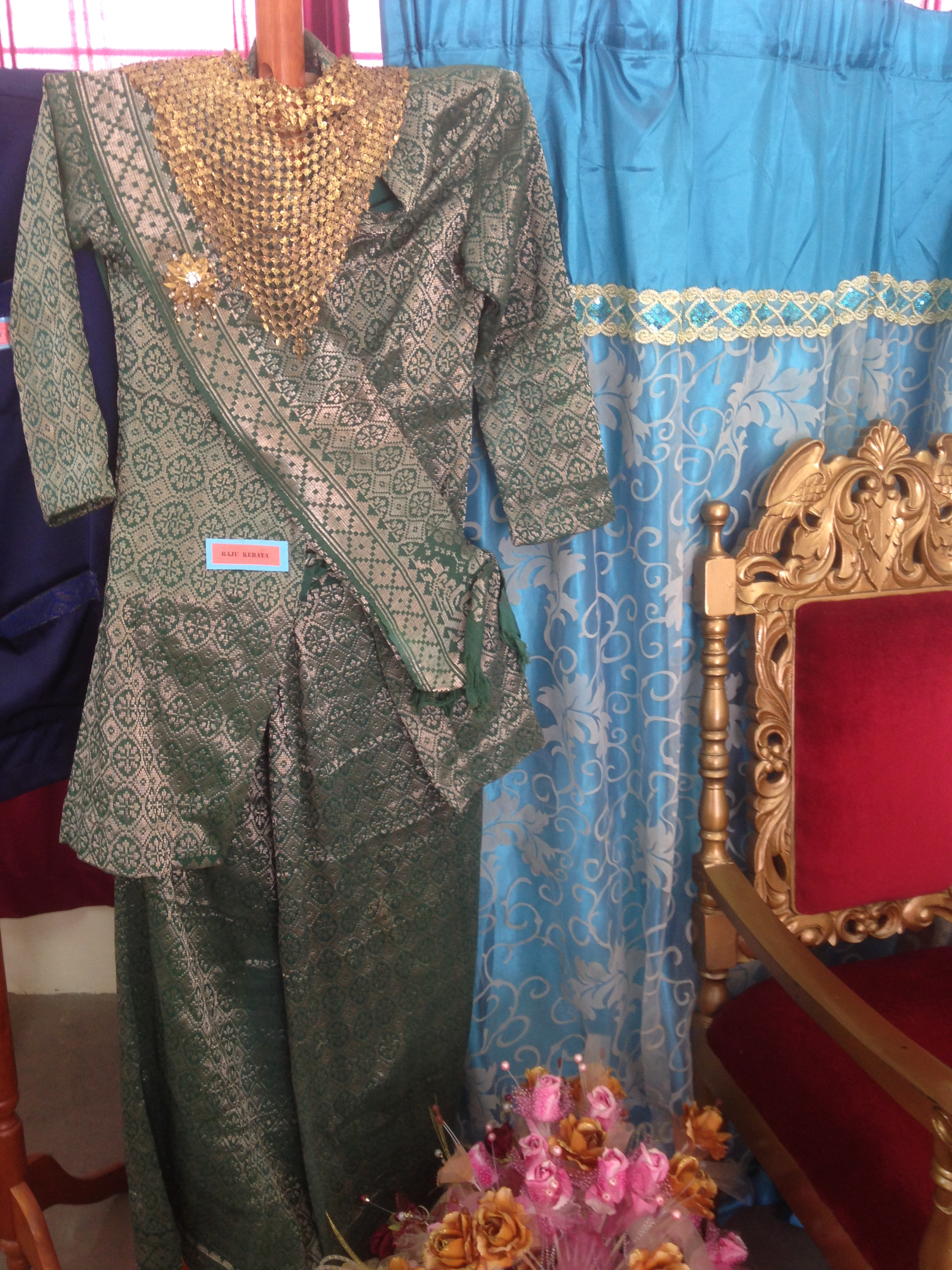 BAJU KEBAYA